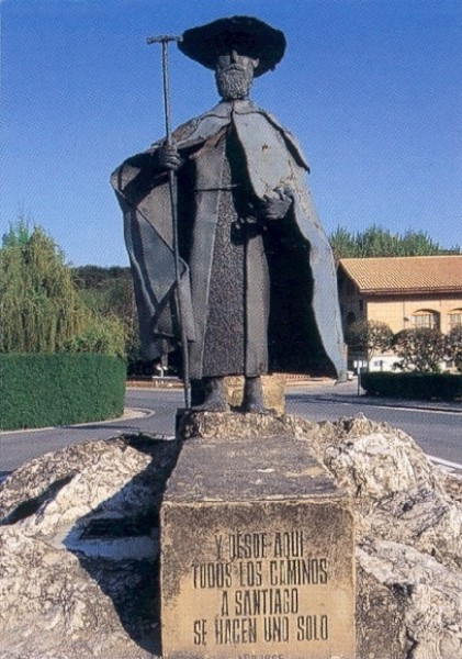 Date du cliché : septembre 2001.